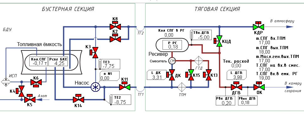 Схема топливной системы газотурбовоза ГТ1-001